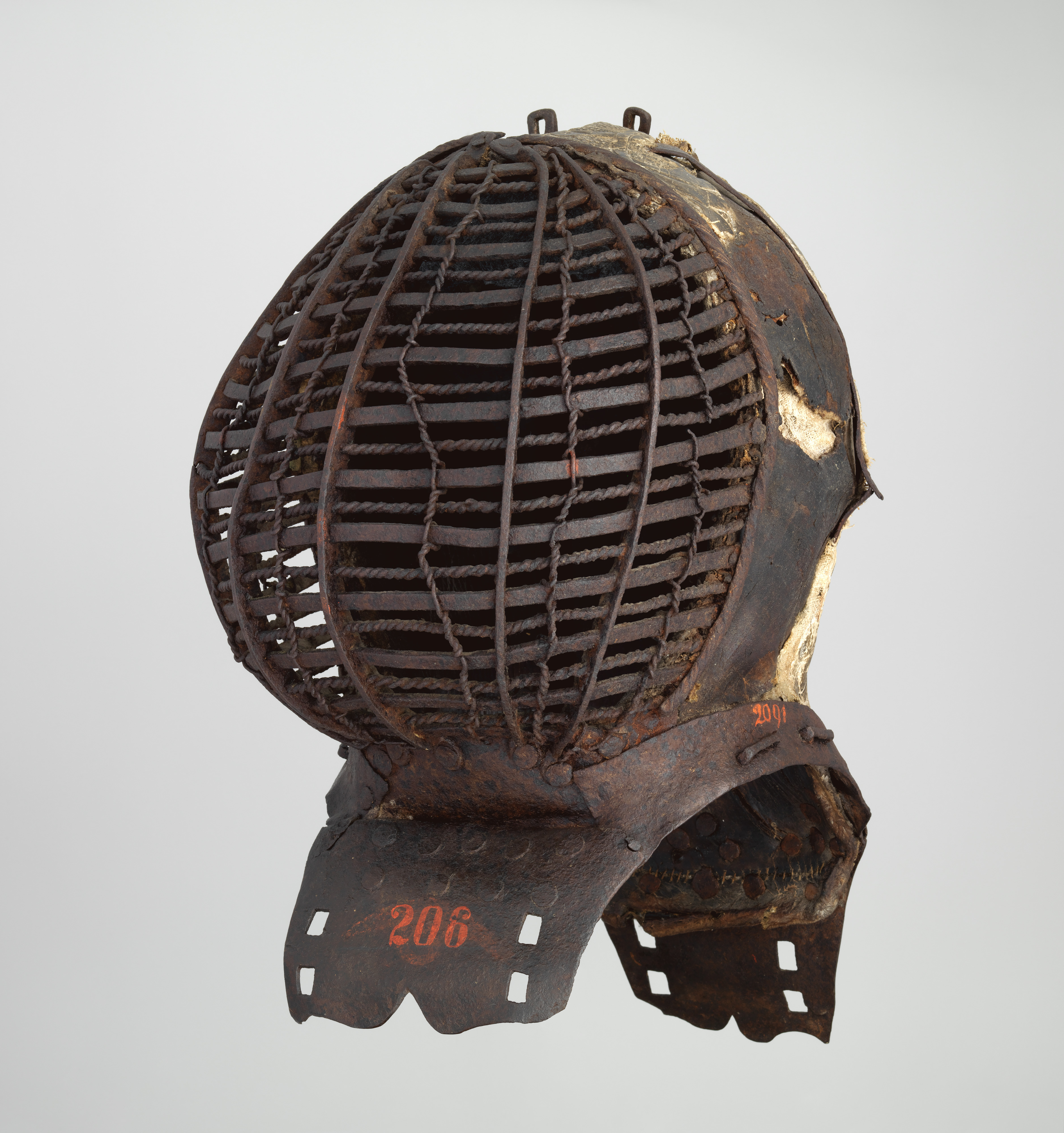 German; Tournament helm (Kolbenturnierhelm); Helmets